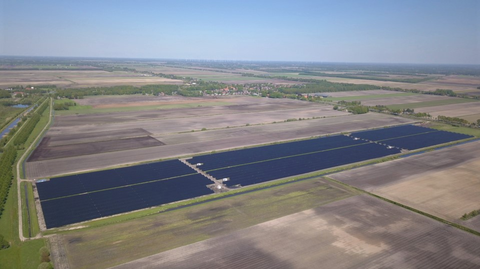 Zonnepark Lange Runde met op de achtergrond het dorpje Barger-Compascuum